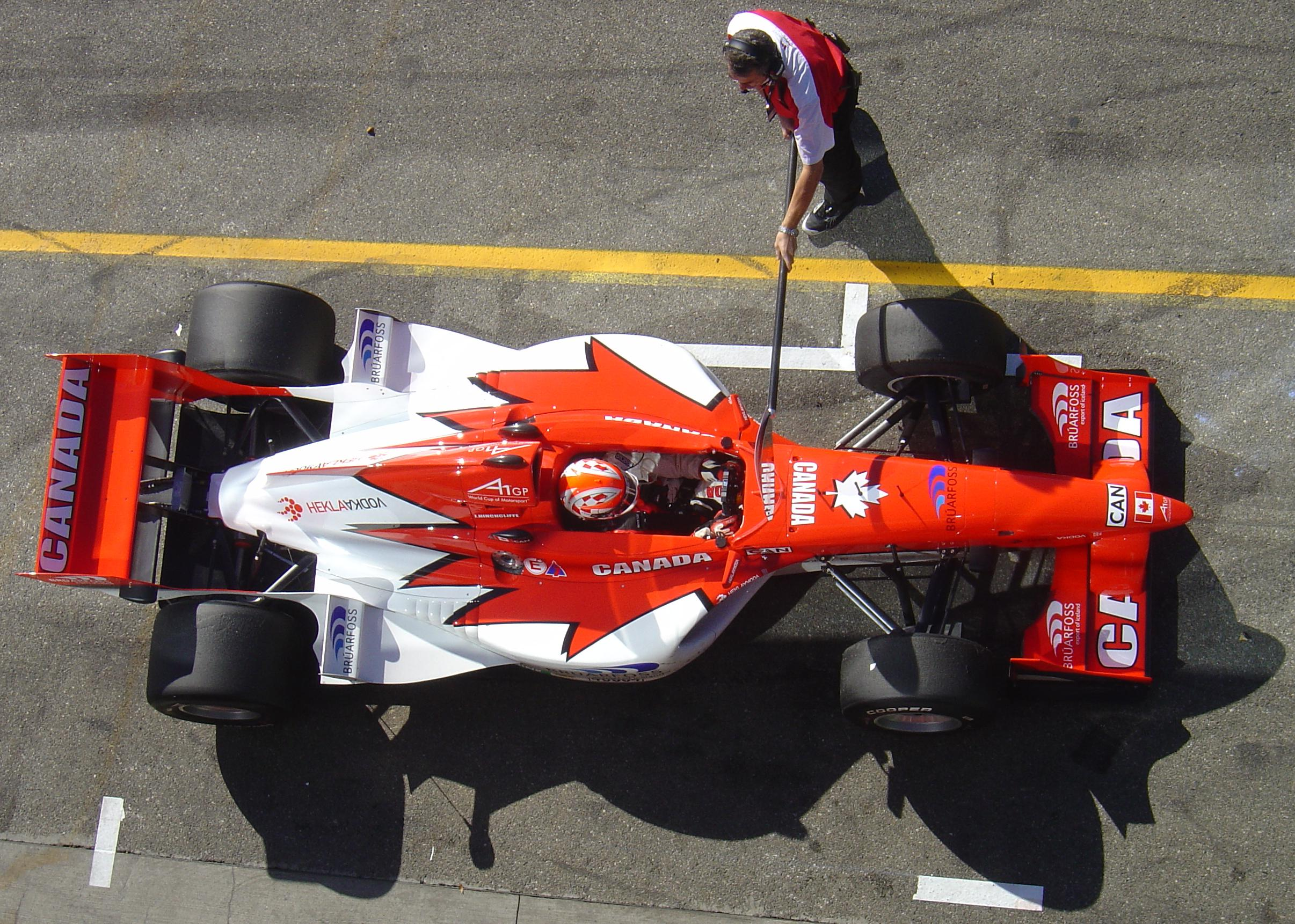 A1 Team Kanada, entstanden im Rahmen des A1GP-Rennwochenendes auf dem Automotodrom Brno